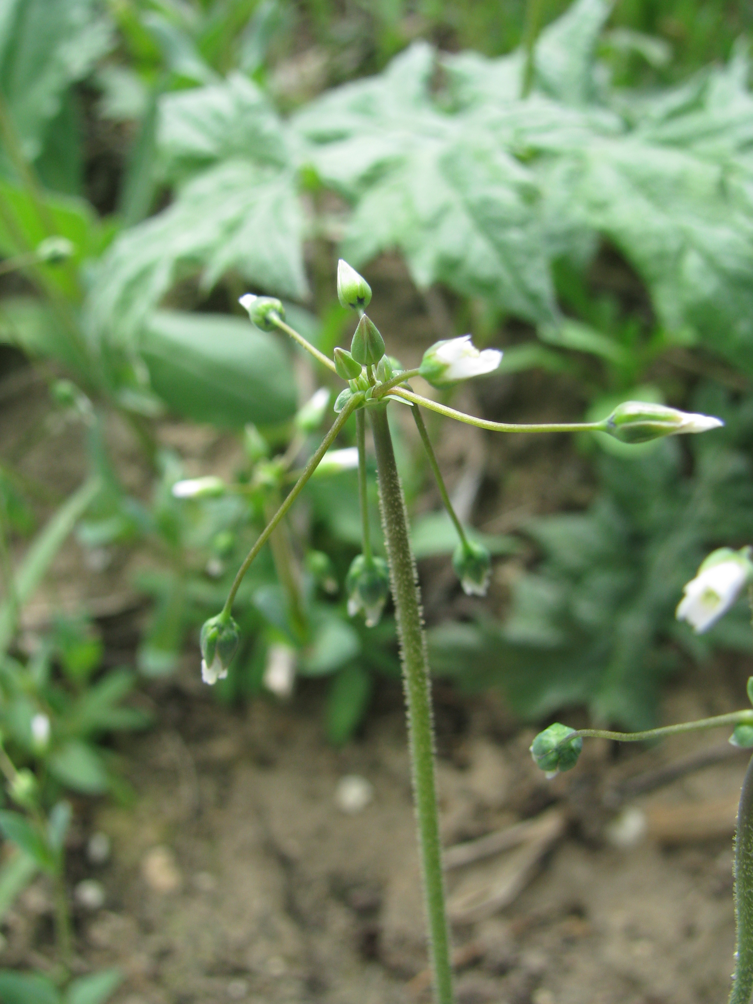 Blütenstand von Doldiger Spurre (Holosteum umbellatum)